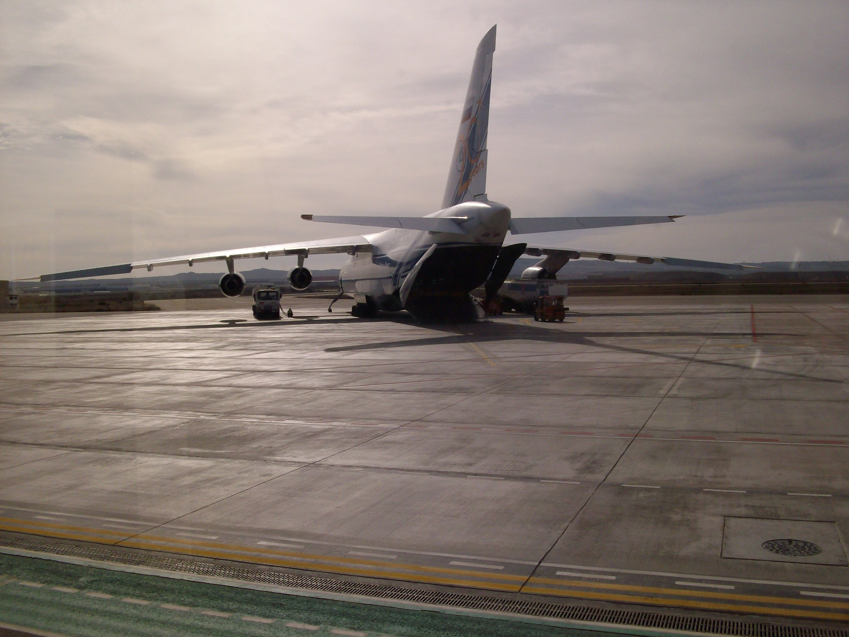 Antonov repostando en el aeropuerto de Zaragoza, España, portando los equipos militares franceses, para la Intervención militar en Malí. (Referencias: Portada del Heraldo de Aragón- viernes 25 de enero de 2013: "Francia utiliza la base de Zaragoza como escala a Mali", con la imagen del Antonov AN 124 - heraldo.es (25/1/2013) . También en